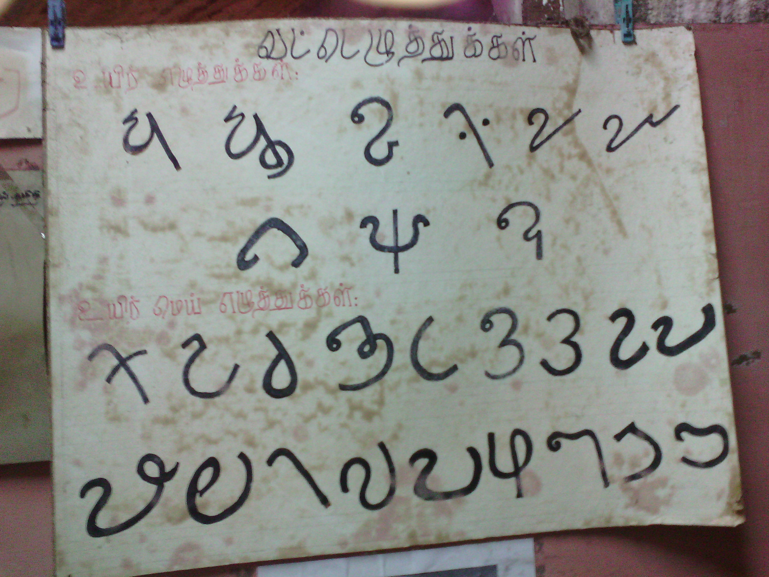 தமிழ் வட்டெழுத்துக்கள், குற்றாலம் தொல்லியல் அருங்காட்சியகம்.